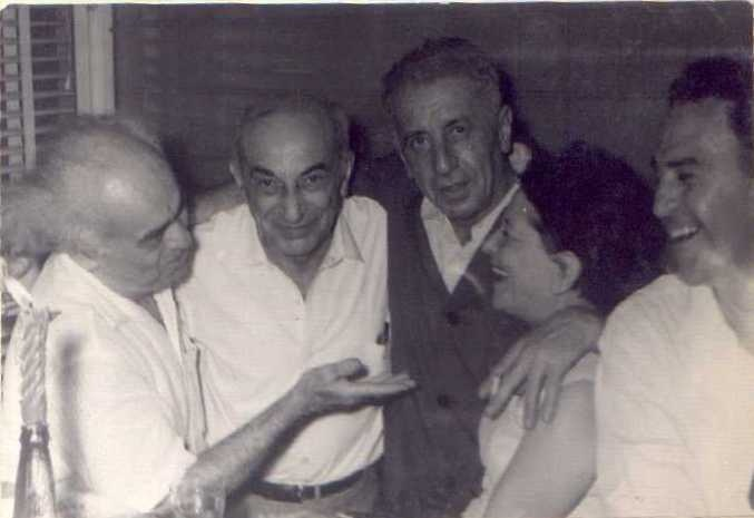 נתן, אלתרמן הורוביץ שלונסקי